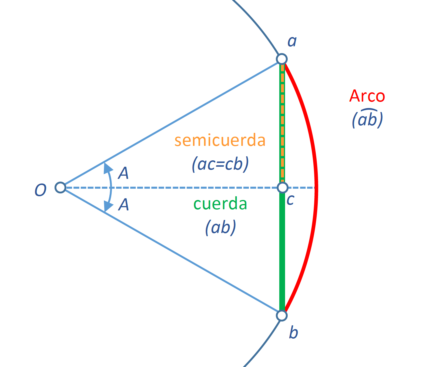 Relación entre el arco, la cuerda y la semicuerda de un ángulo dado